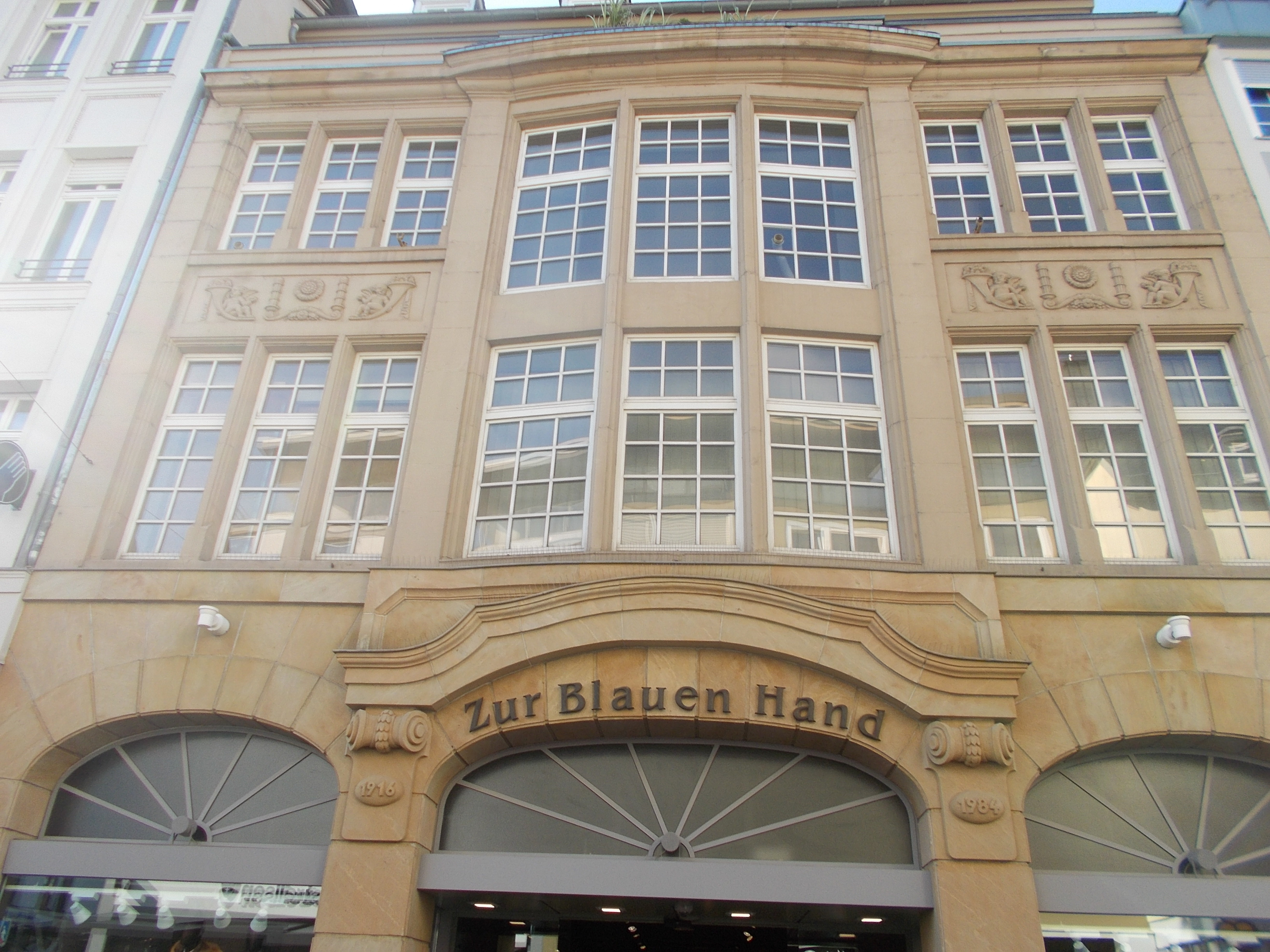 Brotstraße 39 Trier/Zur blauen Hand